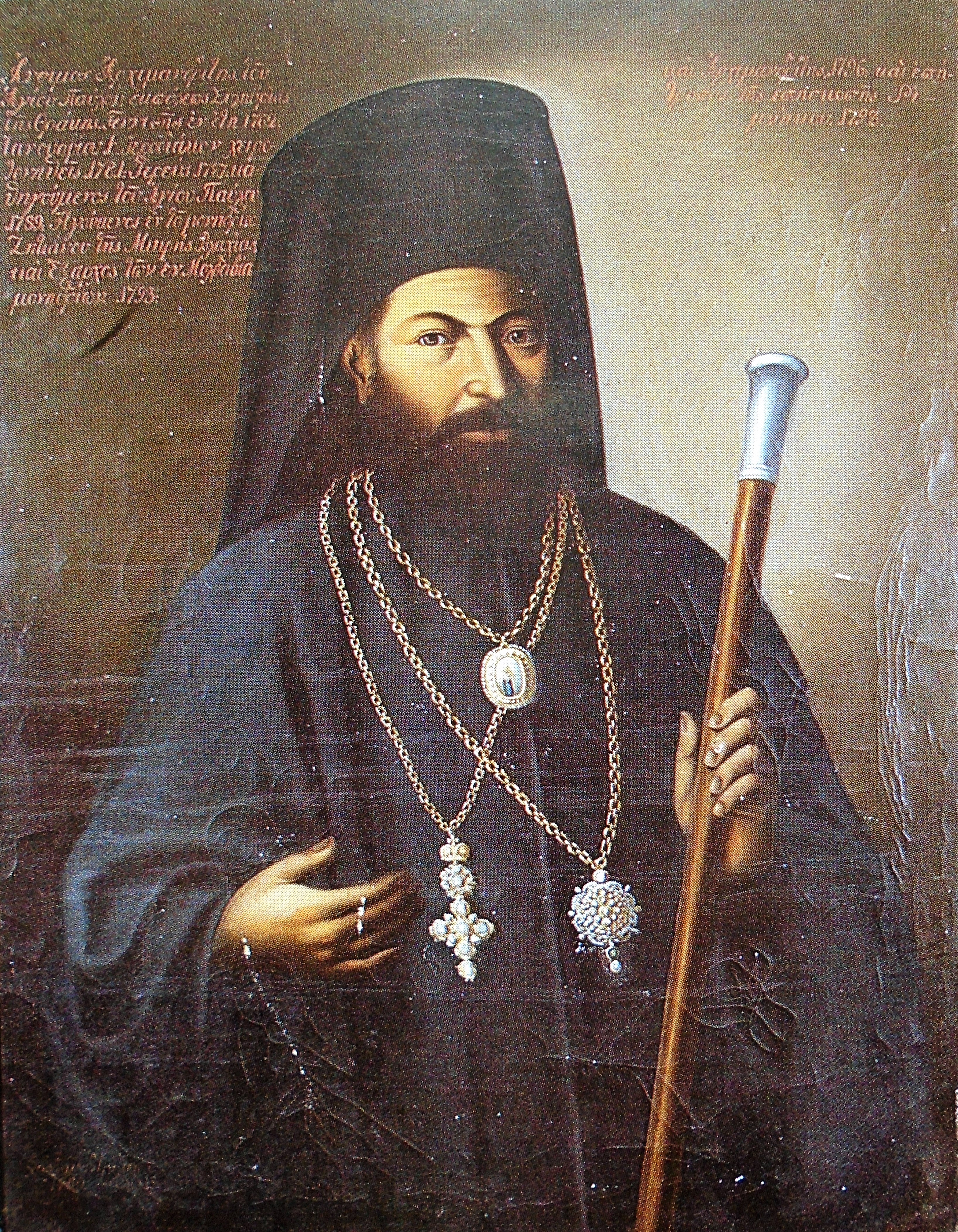 Arhimandritul Antim, egumenul Mănăstirii Jitianu între anii 1792 și 1815.